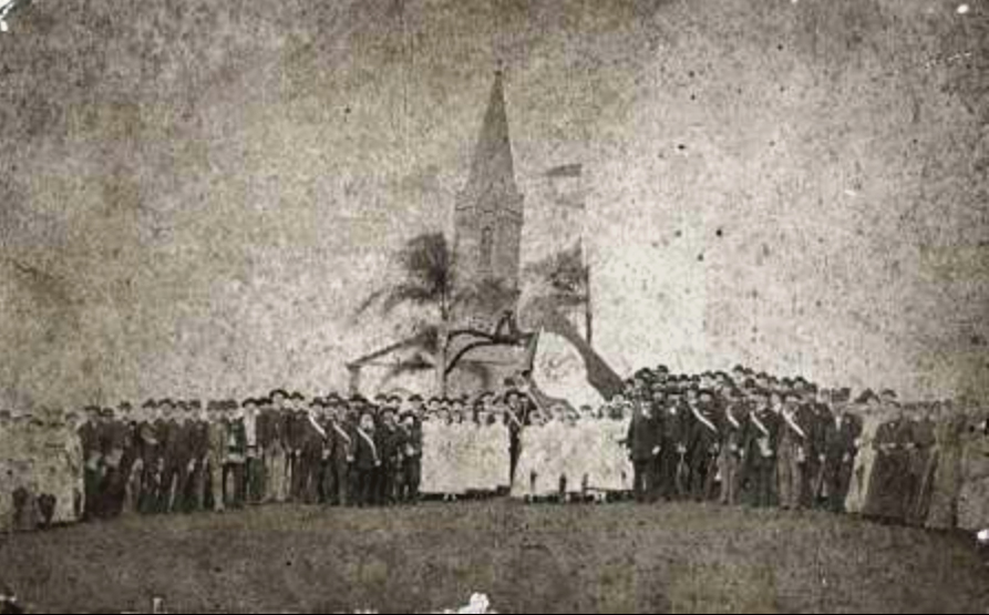 Primeira capela de Novo Hamburgo, Nossa Senhora da Piedade de Hamburger Berg (Hamburgo Velho)